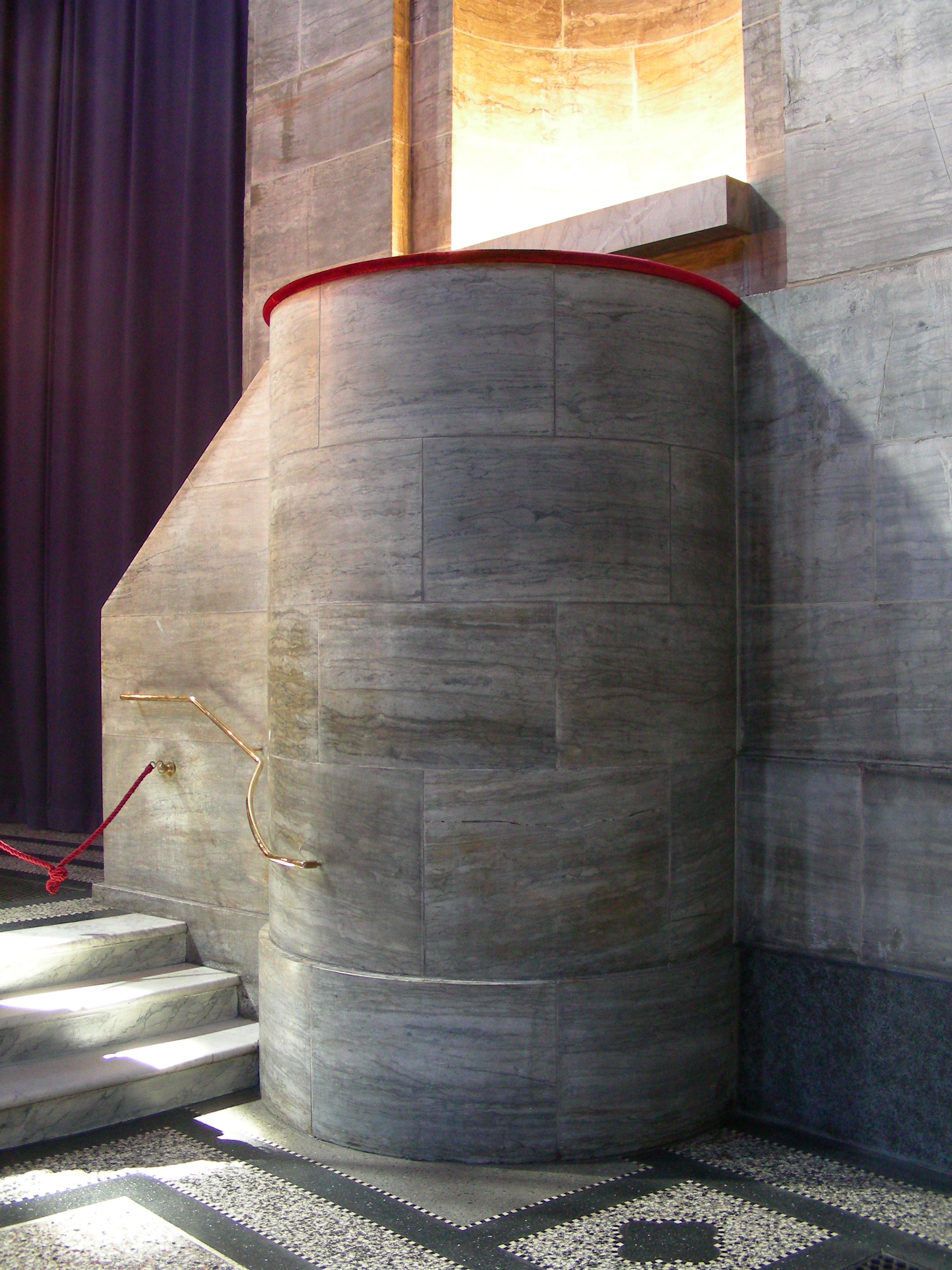 Marmorkirken, Copenhagen, Denmark. Pulpit.